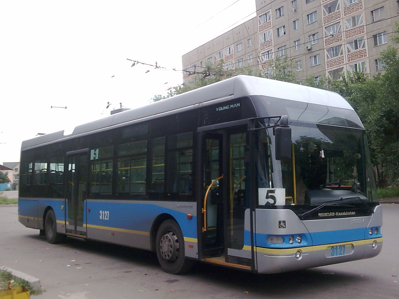 Алматинский троллейбус. Модель «Neoplan Kazakhstan Young Man JNP6120GDZ». Маршрут #5.